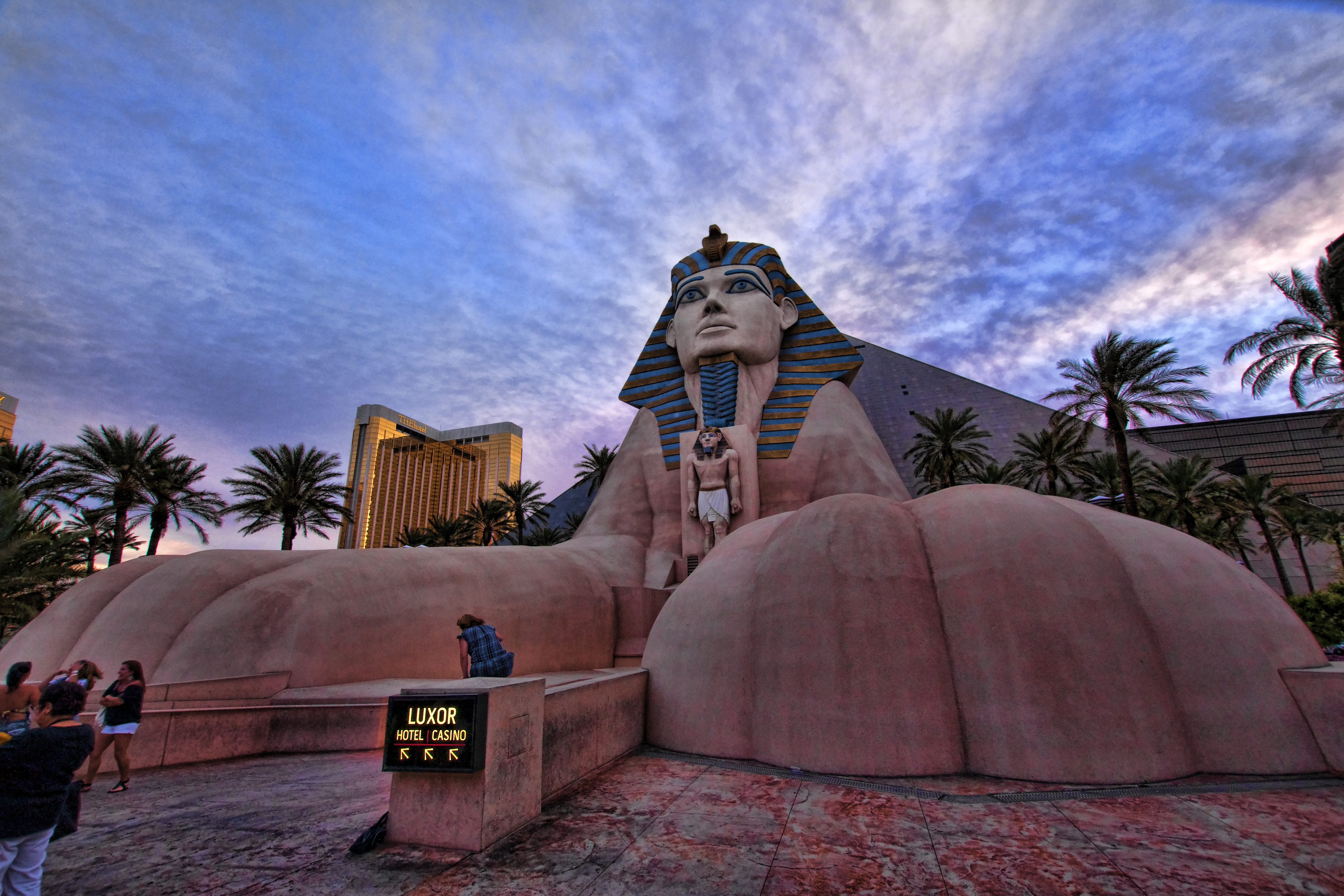 Sphynx du casino "Luxor" à Las Vegas